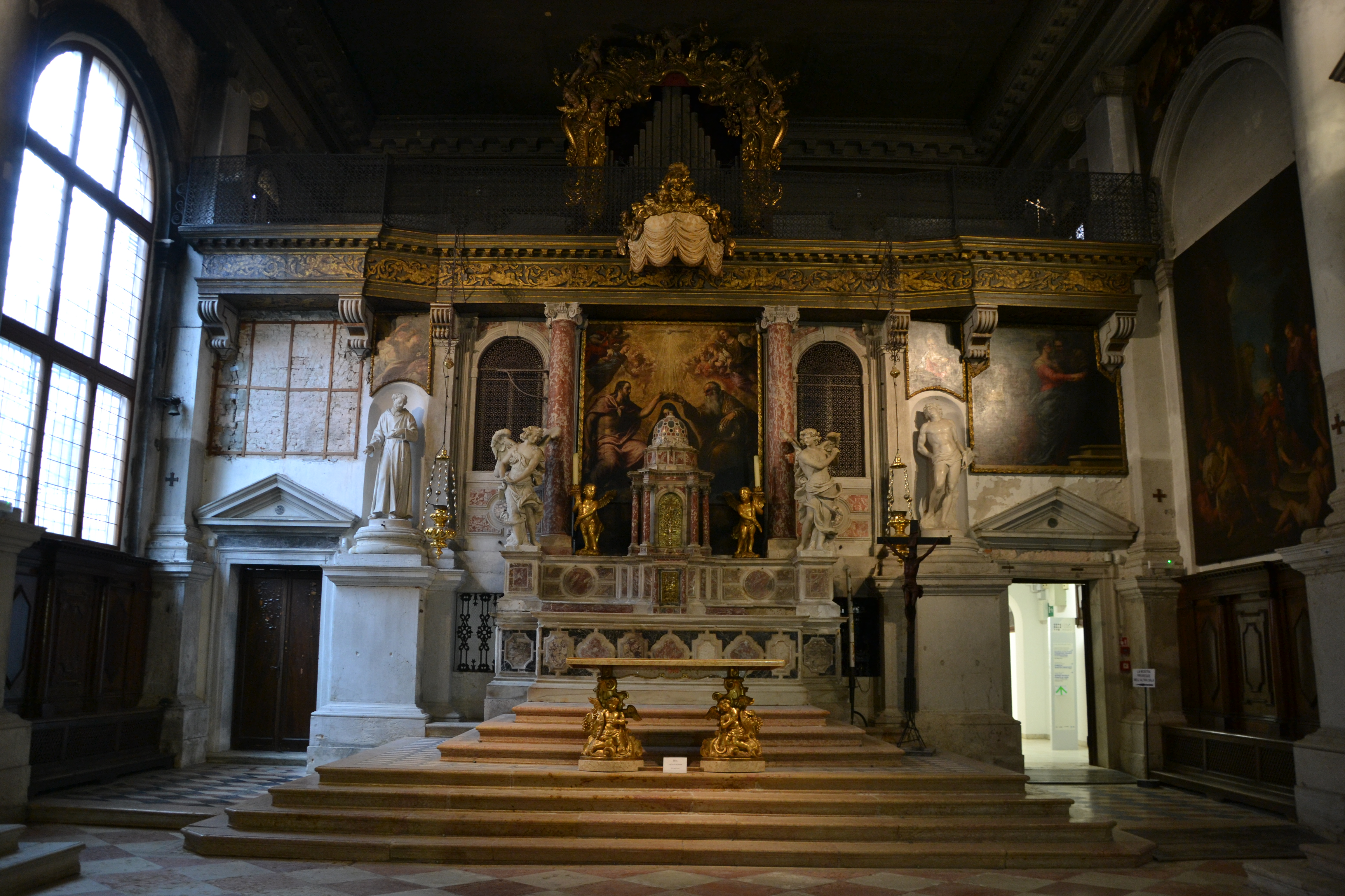 Santa Maria dei Derelitti (Venezia), vulgo dell’Ospedaletto